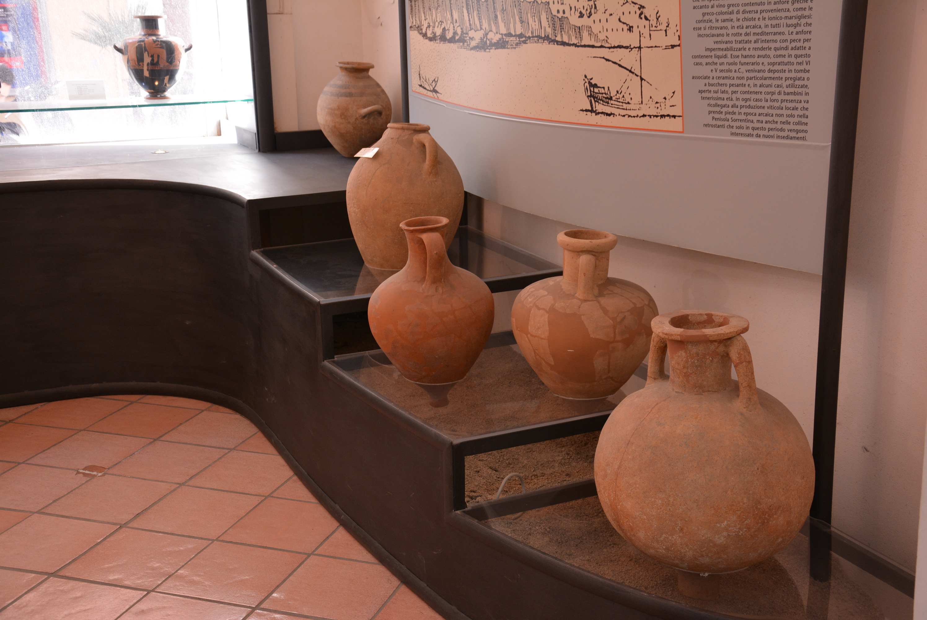 Vedi titolo